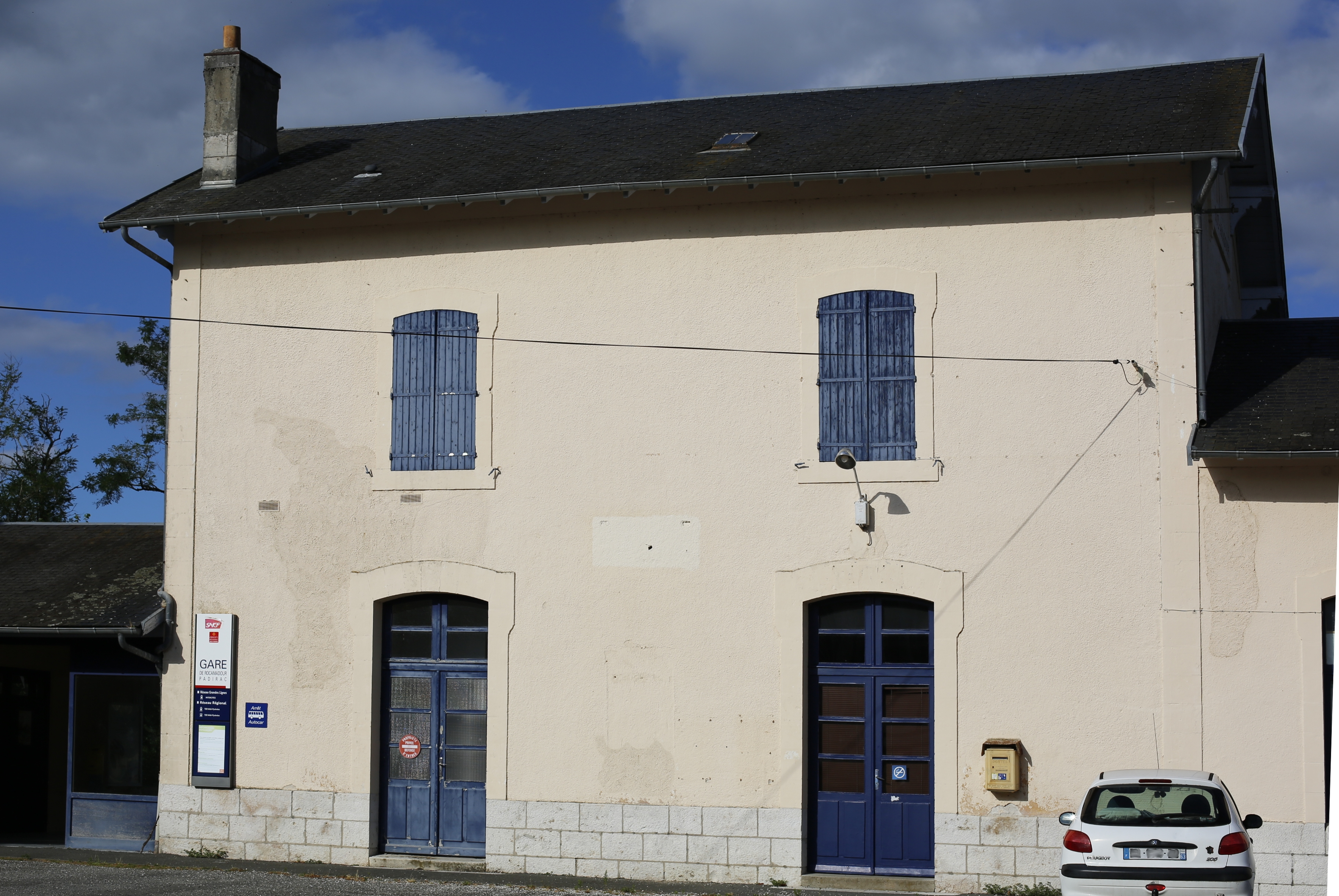 Gare de Rocamadour - Padirac : façade sur cour.